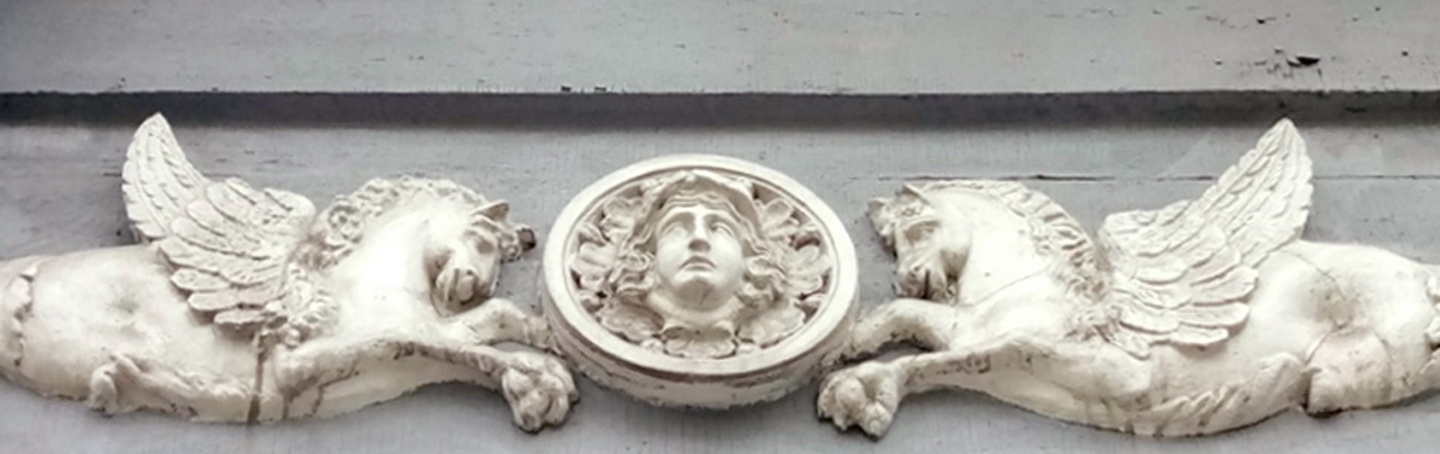 Лепнина на фасаде дома Палибина, памятника деревянного зодчества начала XIX века. Москва, ул. Бурденко, д.23